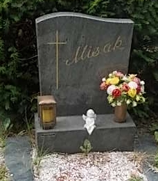 Helmuth Karl Misak-Jedleseer Friedhof (31-46)